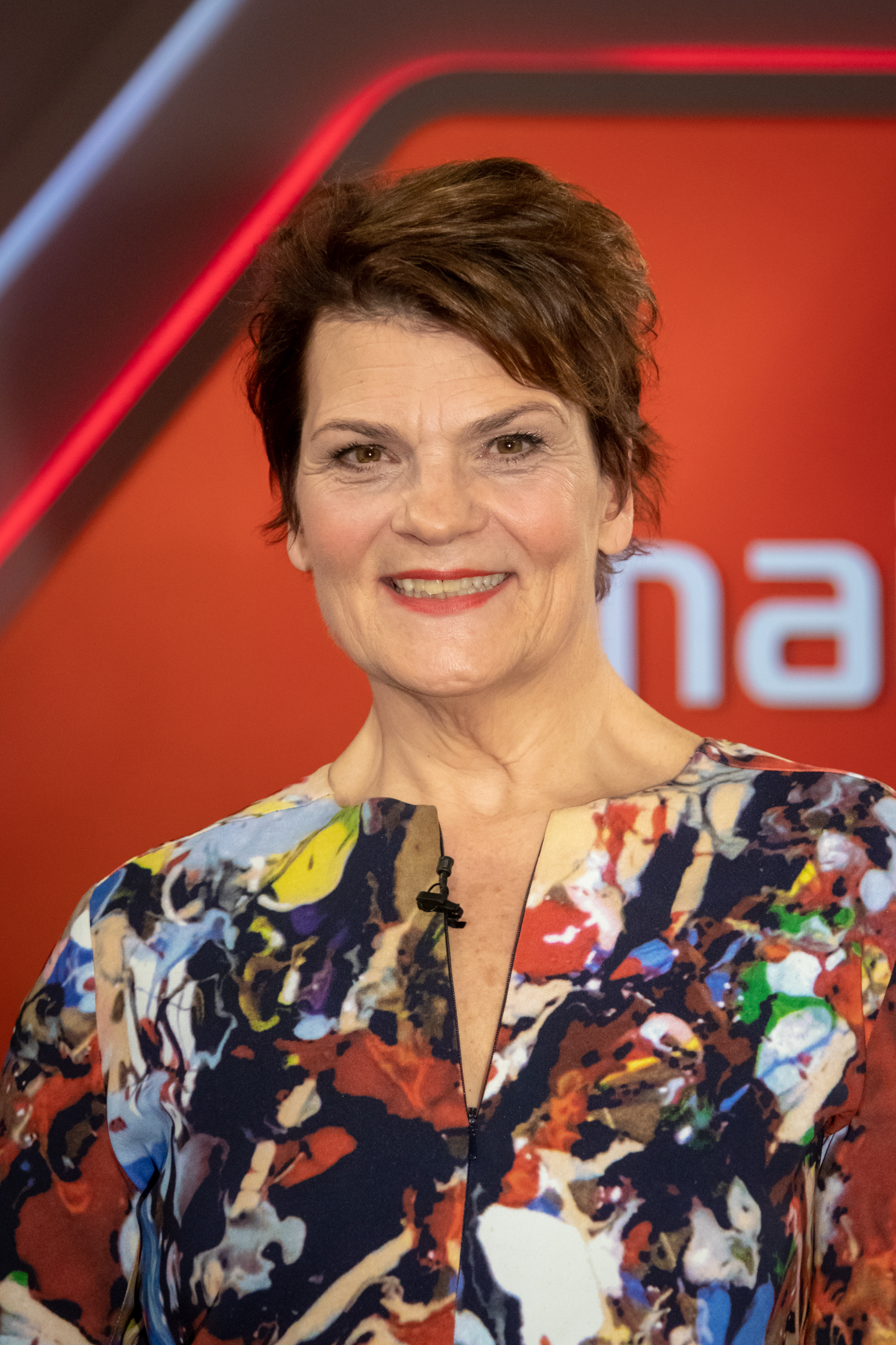 Gayle Tufts in der WDR-Sendung "Maischberger" am 7.11.2018